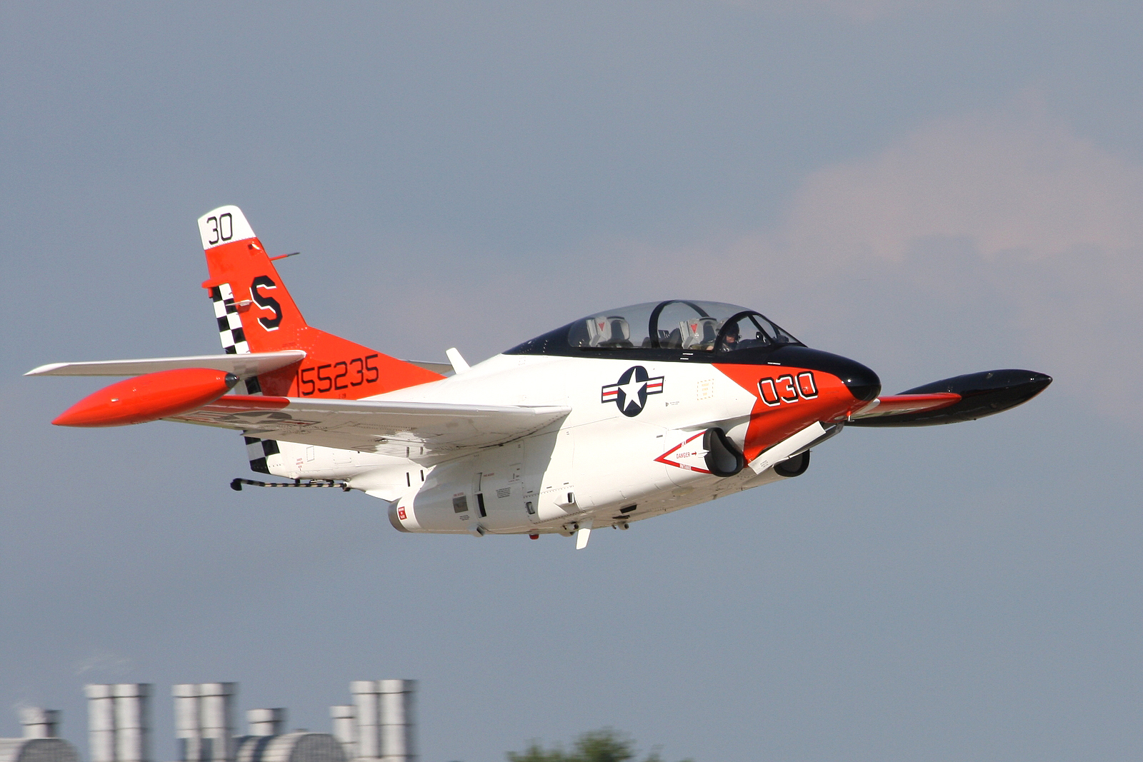 (AirVenture 2008)